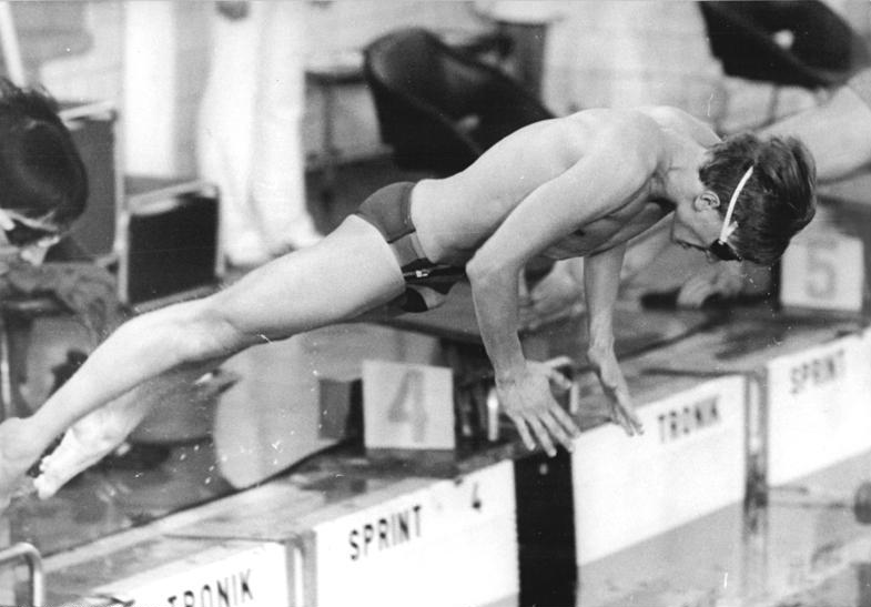 Raik Hannemann ADN-ZB Settnik 28.11.87 Rostock: Hannemann mit DDR-Bestleistung- Am ersten Tag internationaler Kurzbahnwettbewerbe der Schwimmer in der Neptun-Halle kam Raik Hannemann (Foto von einem früheren Wettbewerb) auf das wertvollste Resultat. Mit 1:59,84 min über 200 Meter Lagen erzielte er eine neue DDR-Bestleistung.